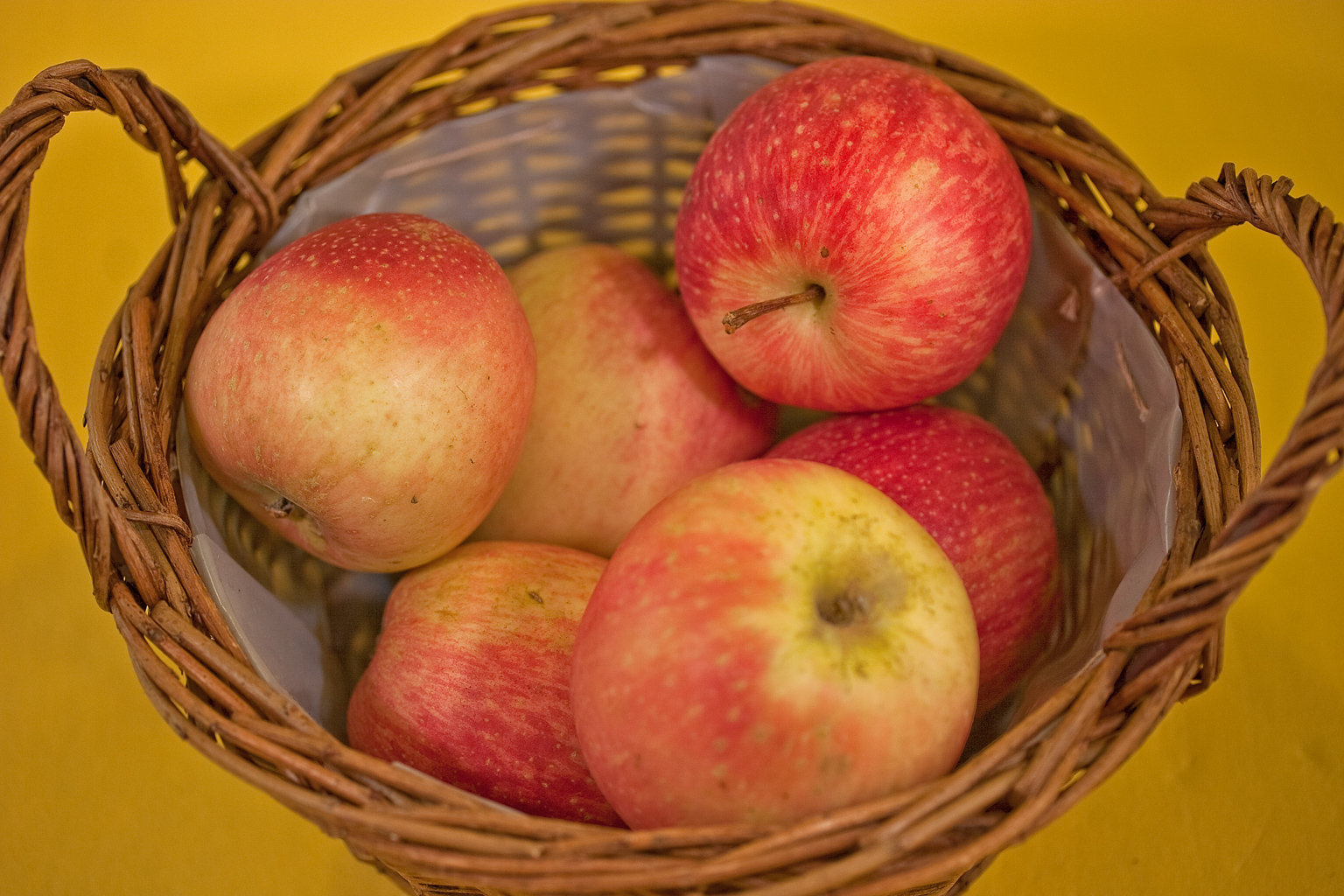 Der Summerred Summerred ist ein Sommerapfel. Die Sorte entstand in den 1960er Jahren in Kanada als Sämling der Sorte Summerland.